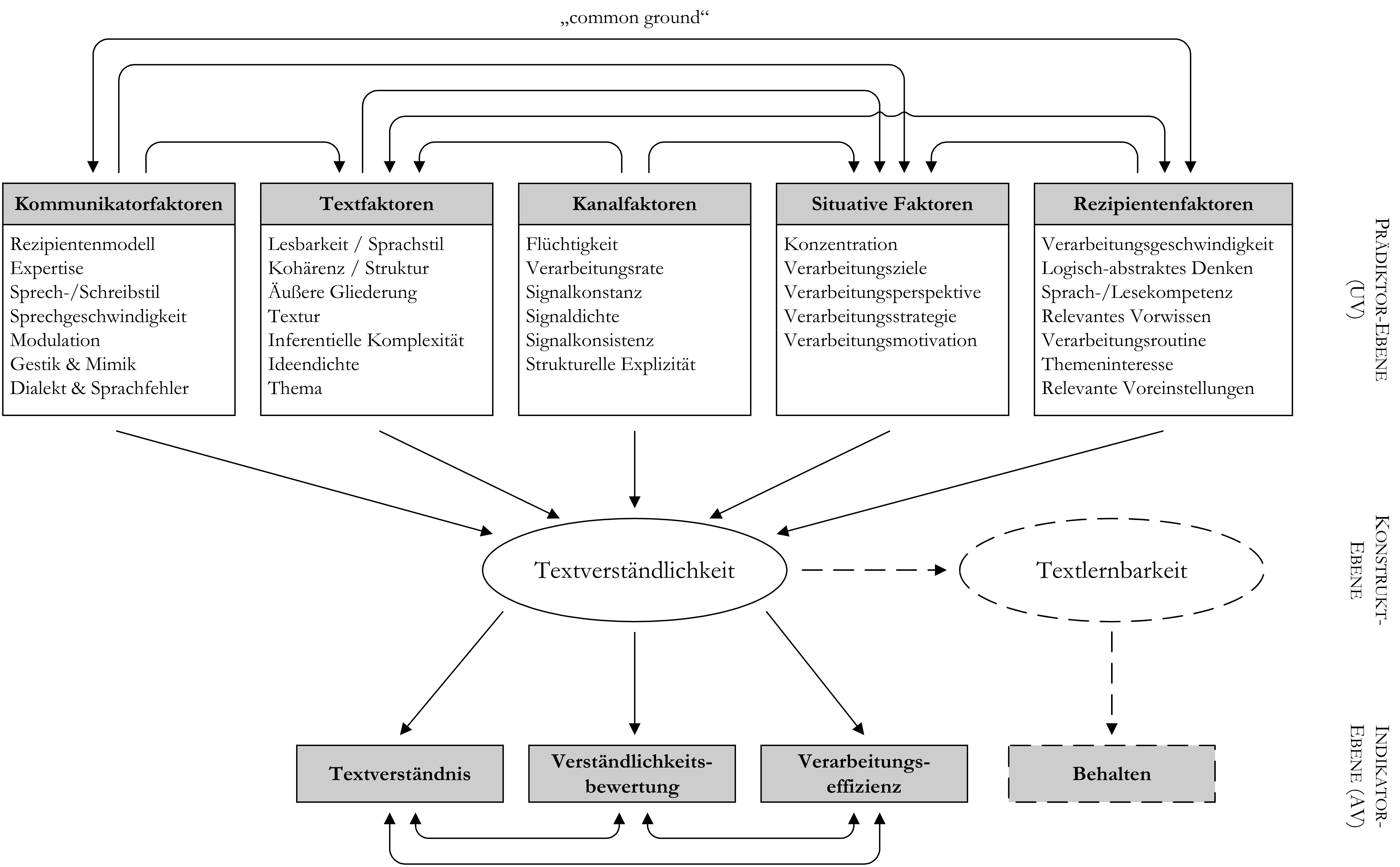 Hohenheimer Modell der Textverständlichkeit (Quelle: Jan Kercher: Verstehen und Verständlichkeit von Politikersprache: Verbale Bedeutungsvermittlung zwischen Politikern und Bürgern. Wiesbaden: Springer VS, 2013.